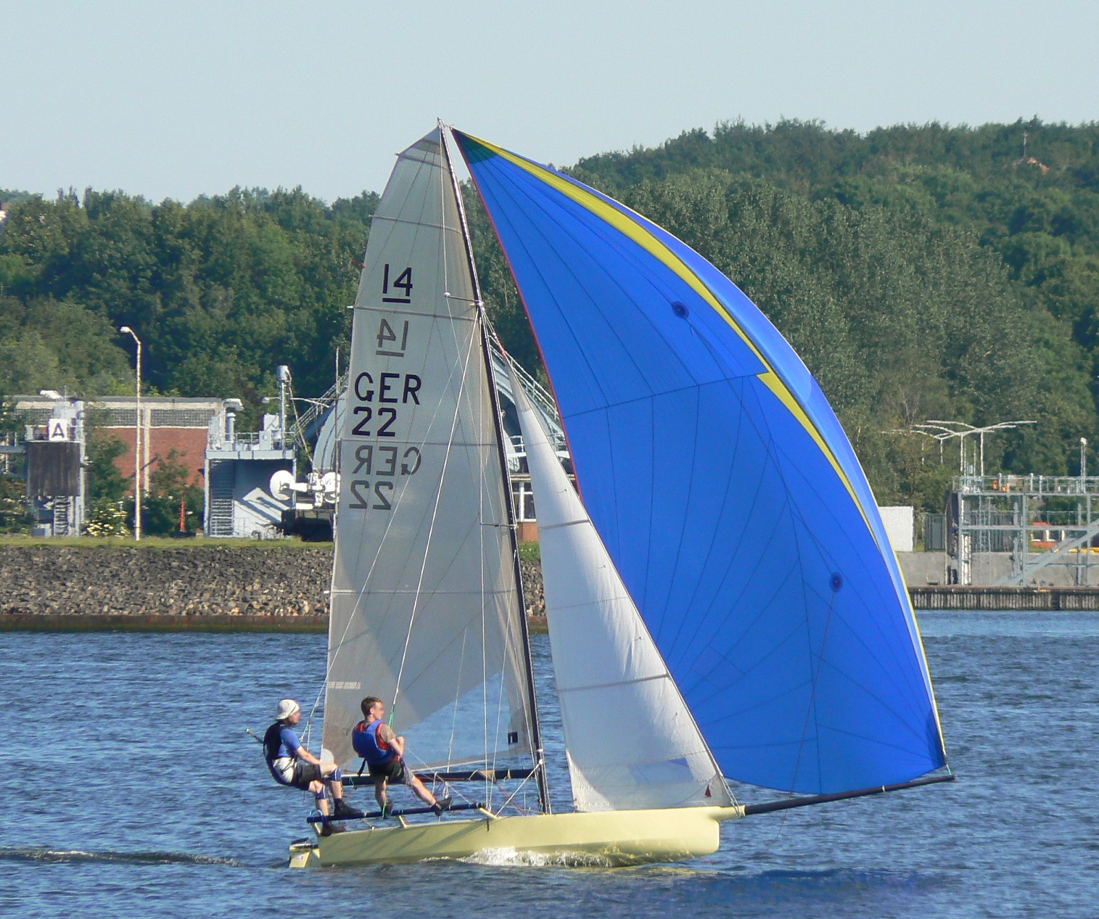 Segelboot der Bootsklasse Internationales 14-Fuß-Dinghy (Int 14) auf der Kieler Förde.